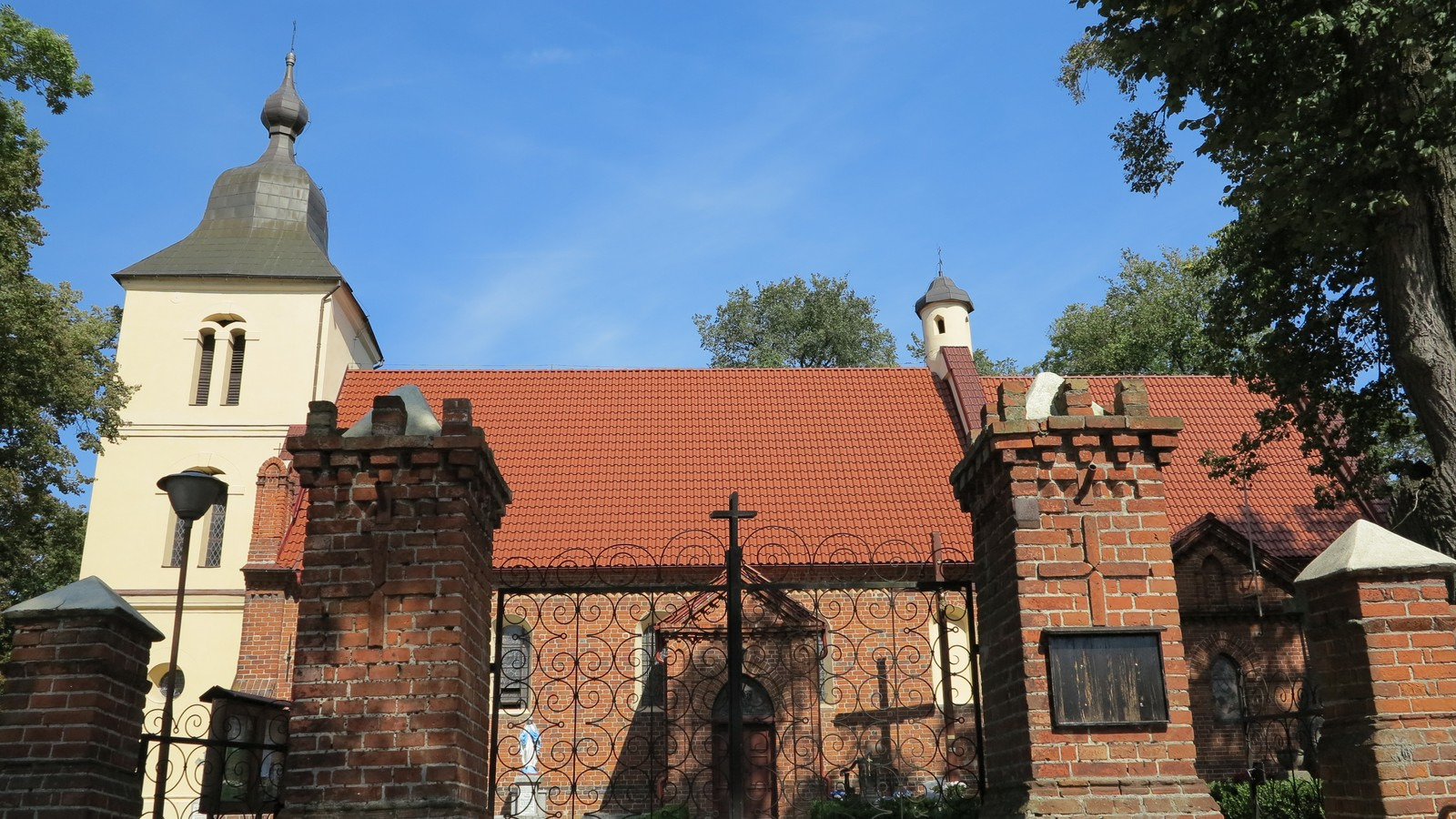 Gruta - rzymskokatolicki kościół parafialny p.w. Wniebowzięcia NMP, XIV, 1670